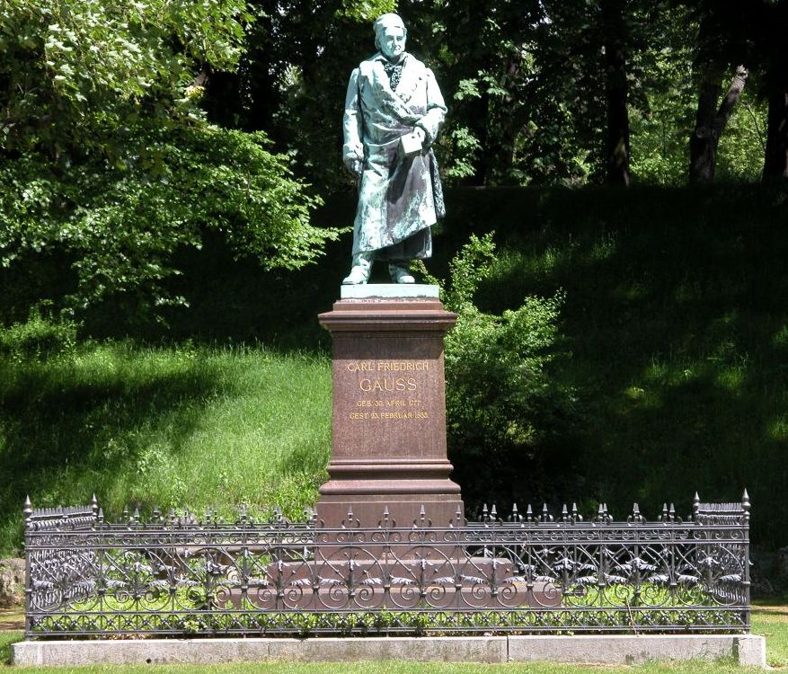 Carl Friedrich Gauß, Standbild des Mathematikers in seiner Geburtsstadt Braunschweig, am Gaußberg (Braunschweig).